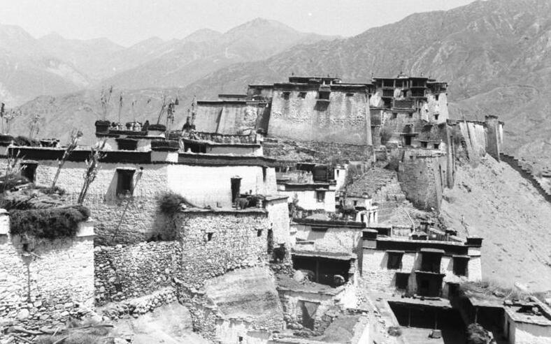 Rimpung Tal, Ortschaft und Burg